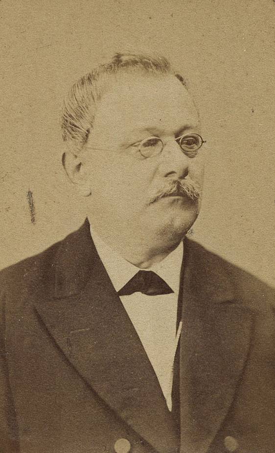 Porträt von Wilhelm Schaffrath, um 1873.